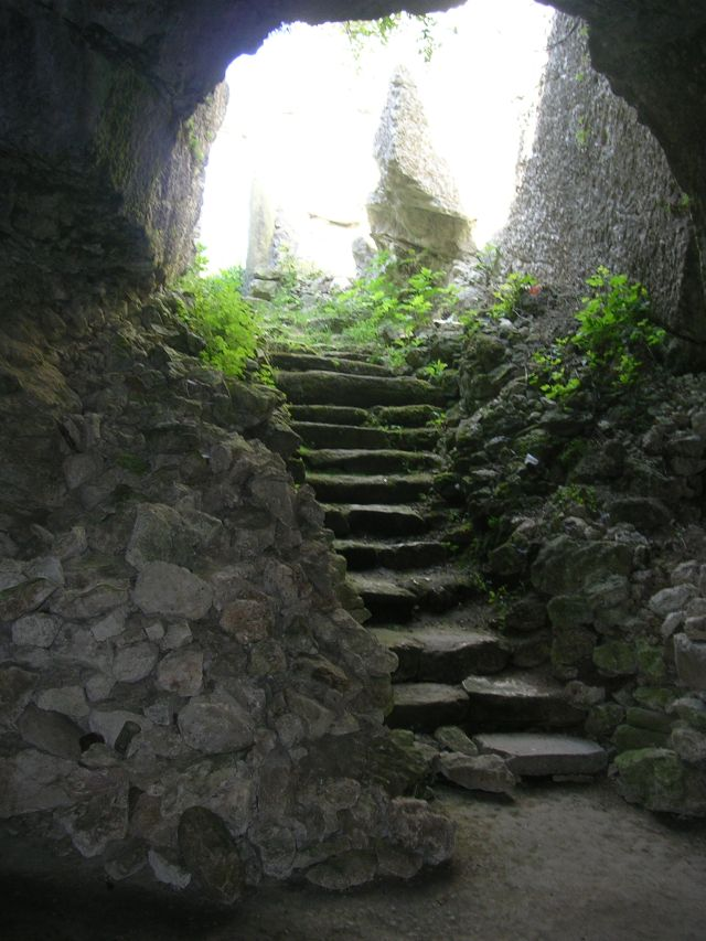 Скалната църква край село Михалич, Хасковско